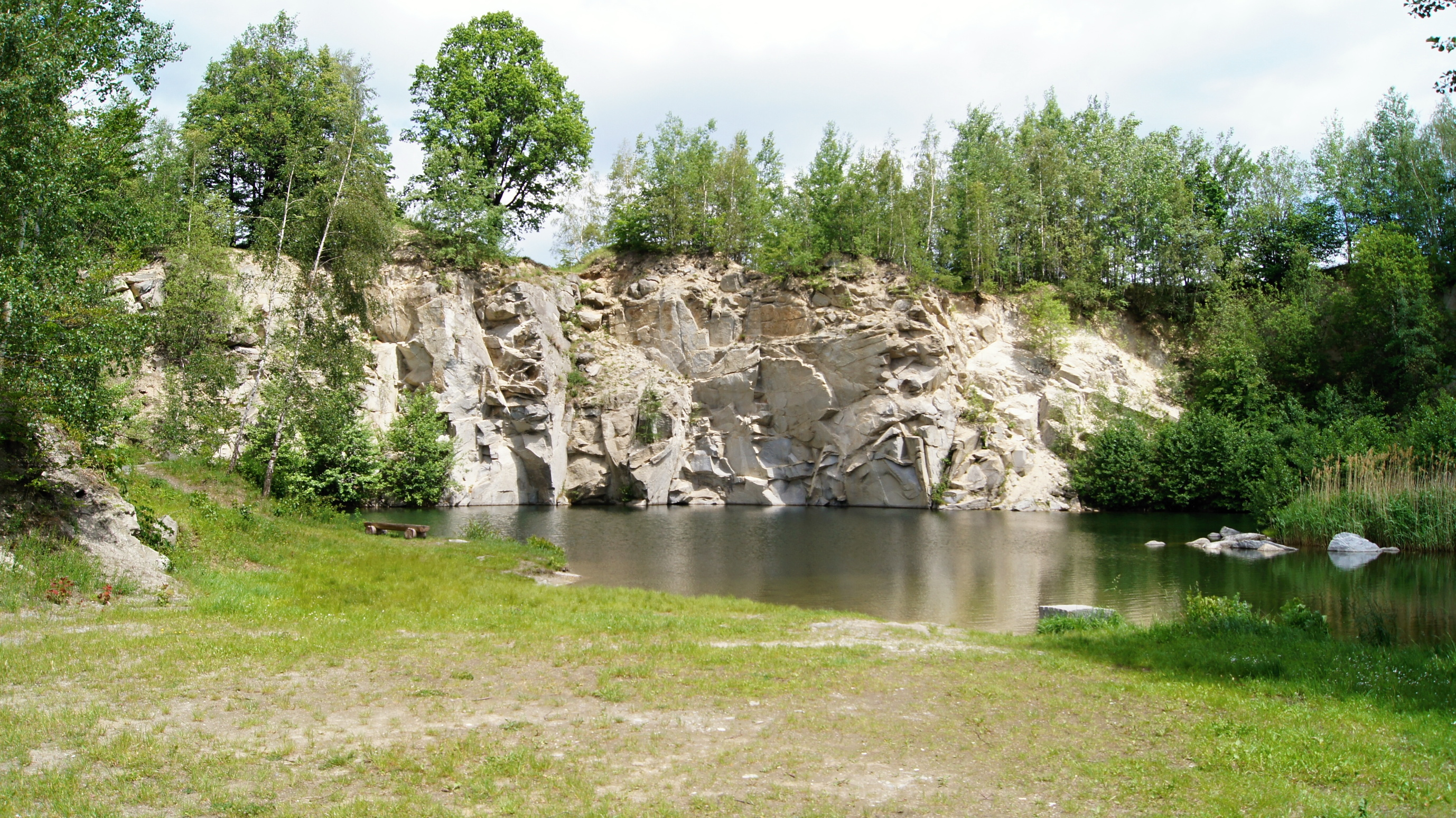 Lom Transgranit nedaleko Žulové, okres Jeseník.